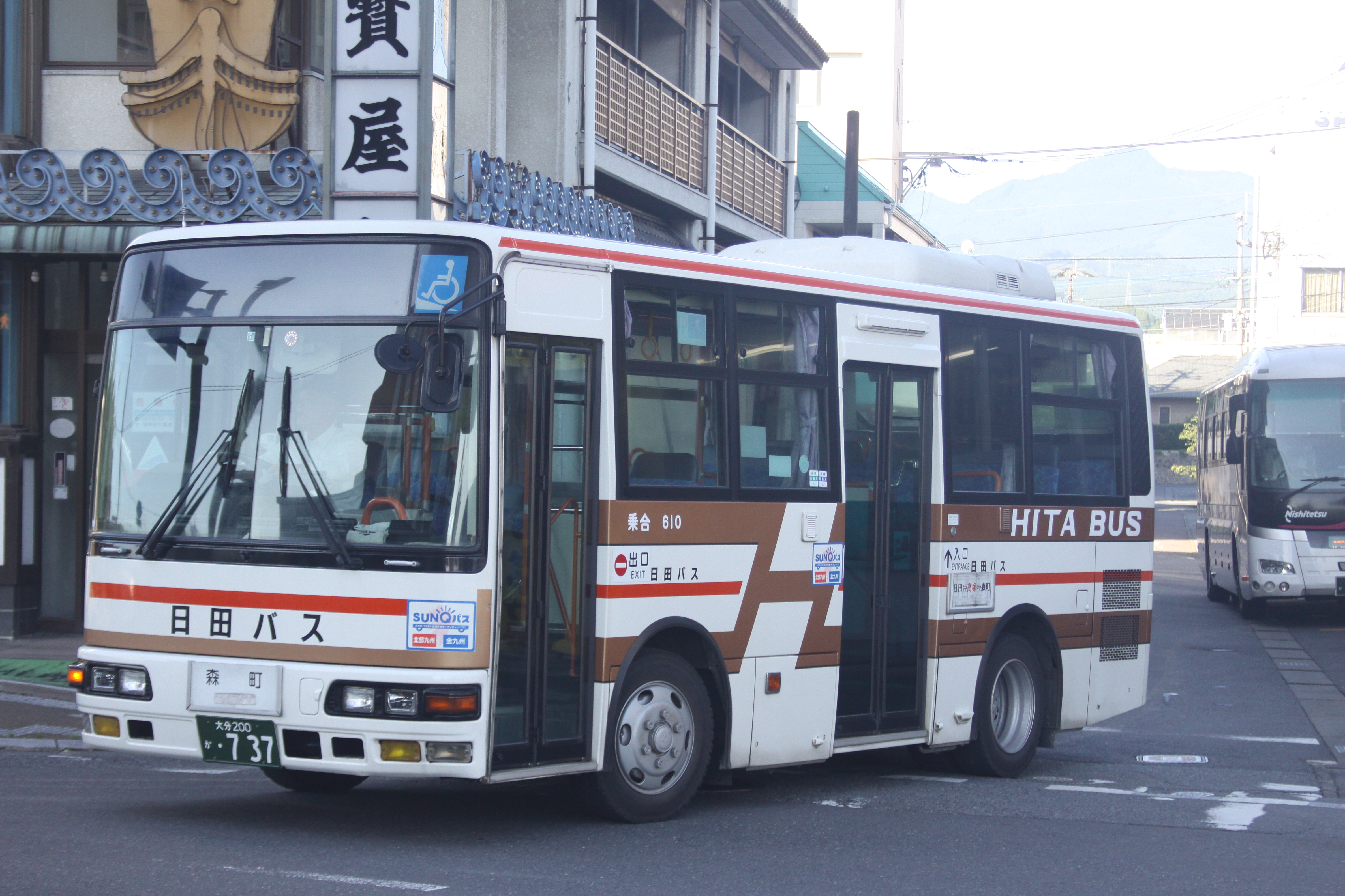 日田バス610 三菱ふそうエアロミディ